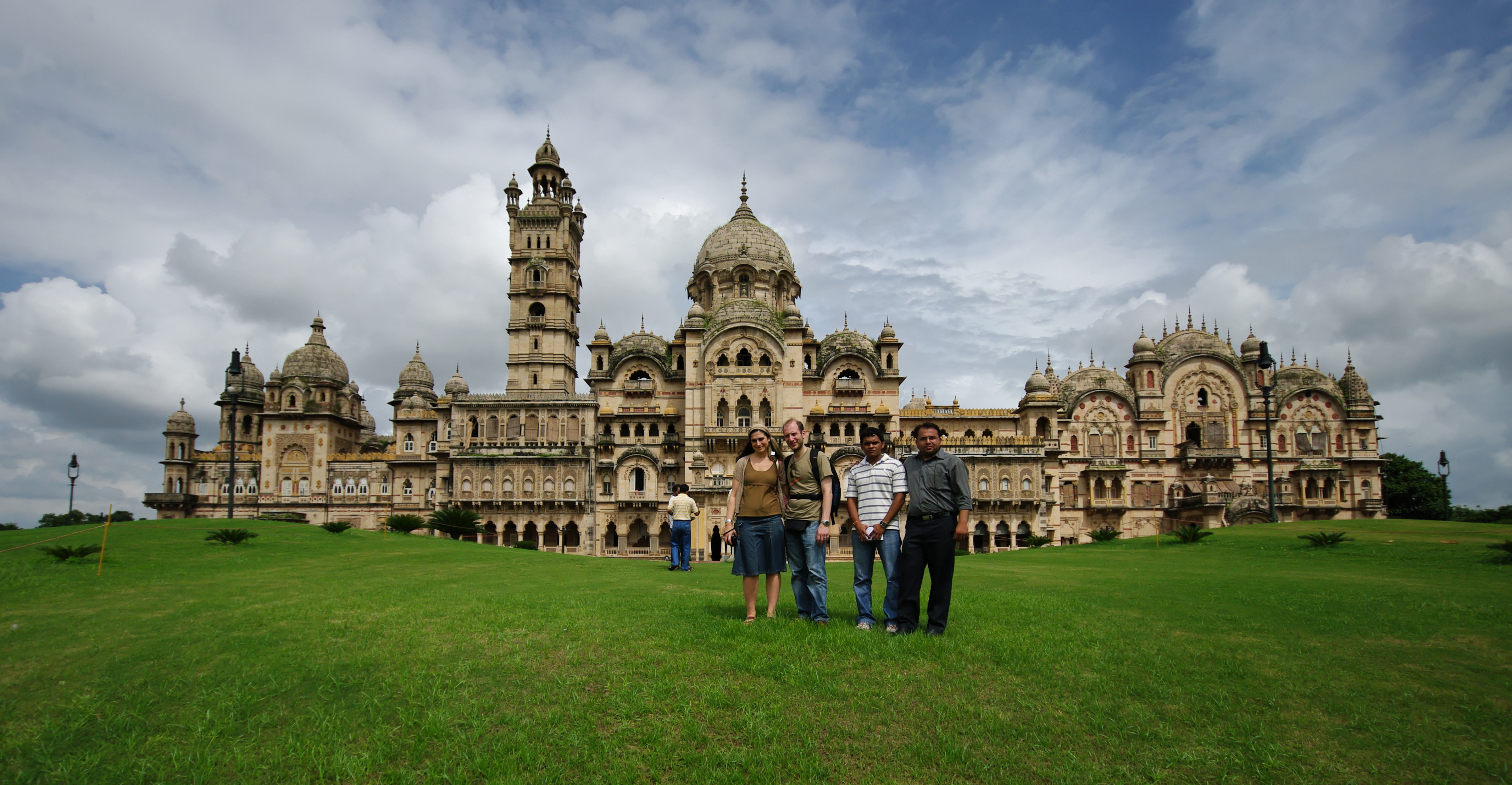 Laxmi Vilas Palace, Vadadora (Baroda) - India